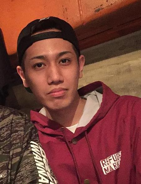 on Instagram ift.tt/2pVfnid